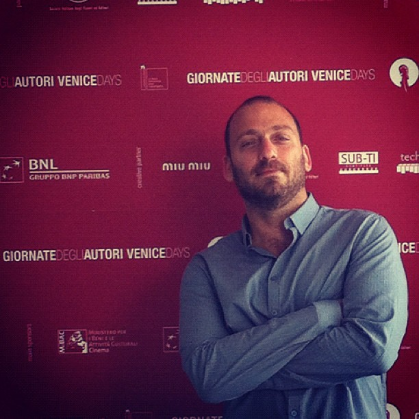 בפסטיבל הסרטים של ונציה 2012